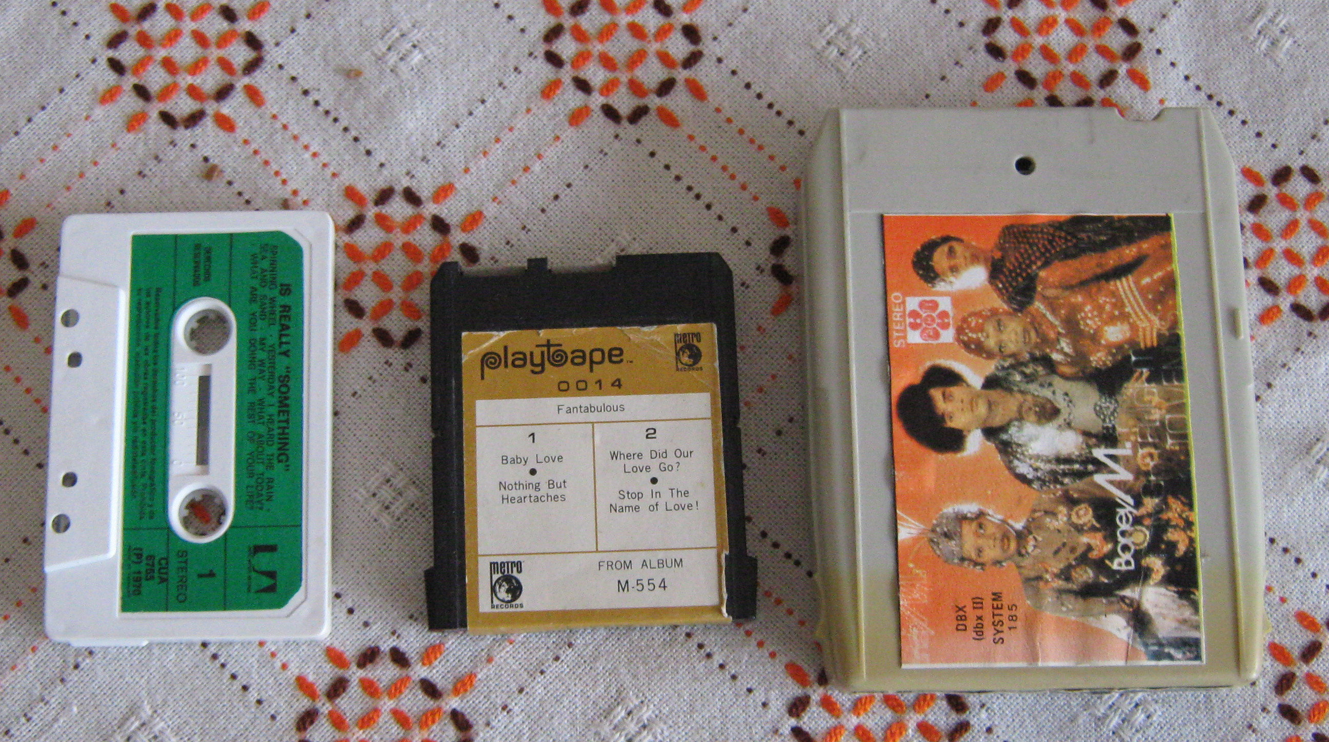 Kompaktkassette (links), PlayTape Cartridge (mitte) und 8-Track Cartridge (rechts) im Größenvergleich